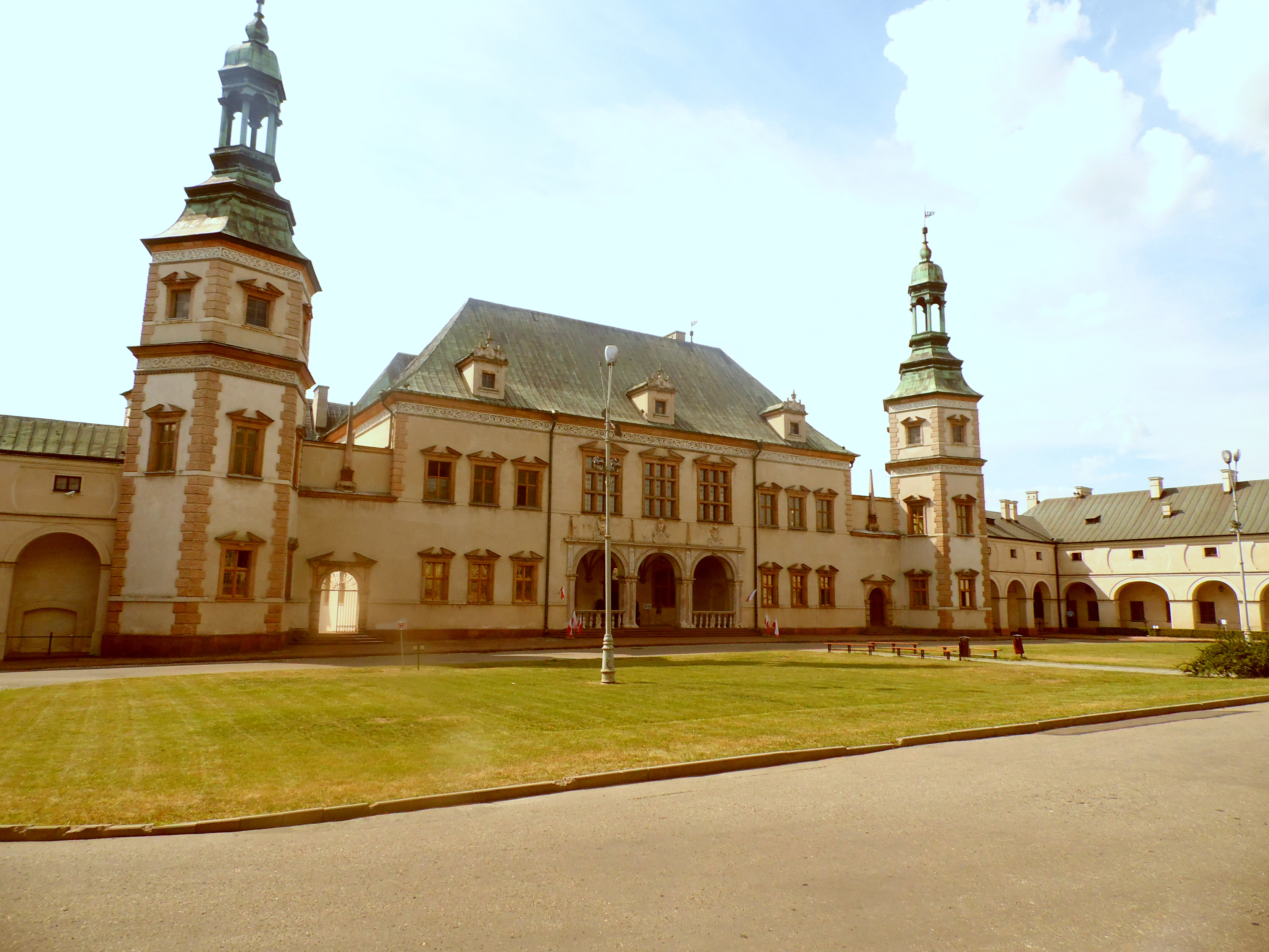 Kielce, pałac biskupi (ze skrzydłami), lata 1637-1641, skrzydła: 1720-1746 r.